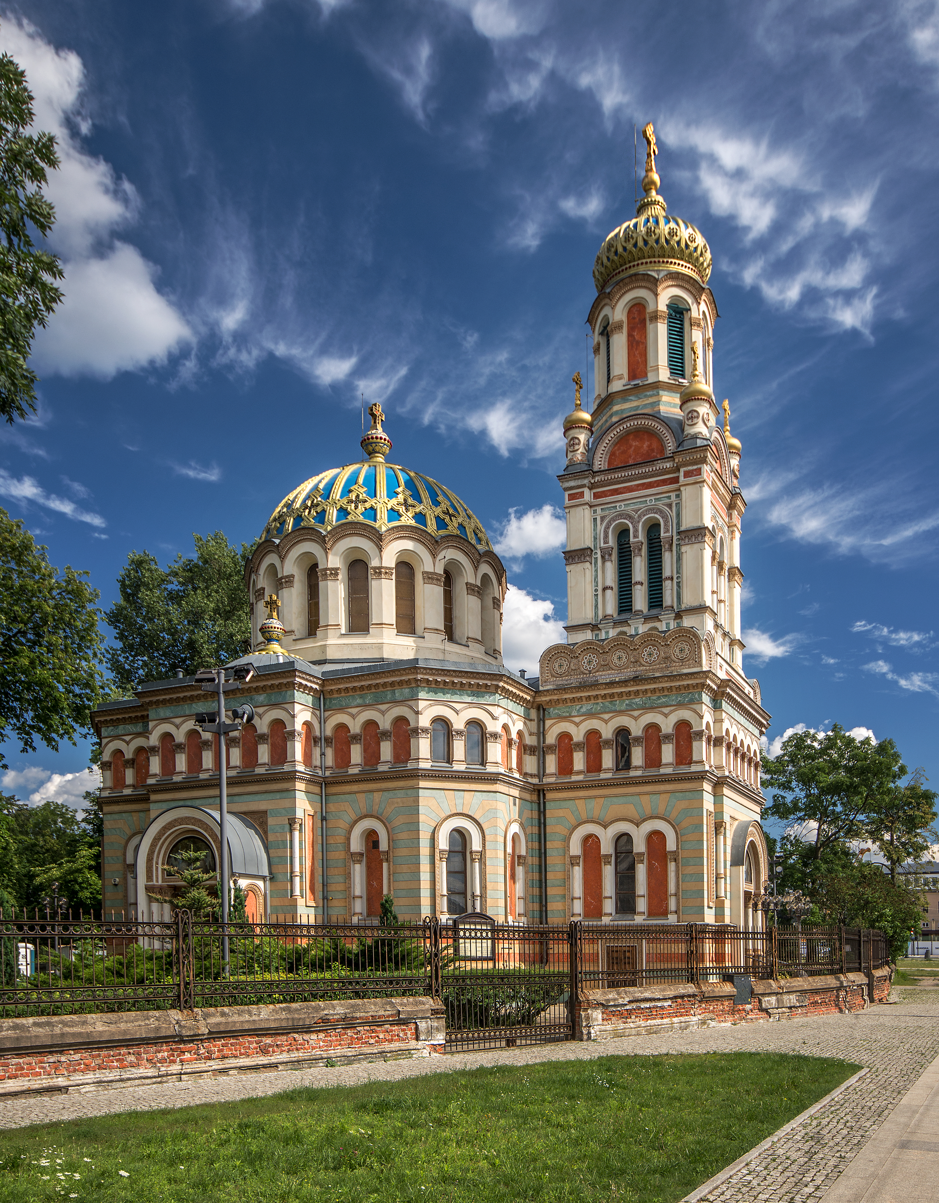 Łódź, cerkiew św. Aleksandra Newskiego, 1880–1884 oraz: cmentarz cerkiewny; A/139 z 20.03.2013 stróżówka, 1890; A/140 z 20.03.2013